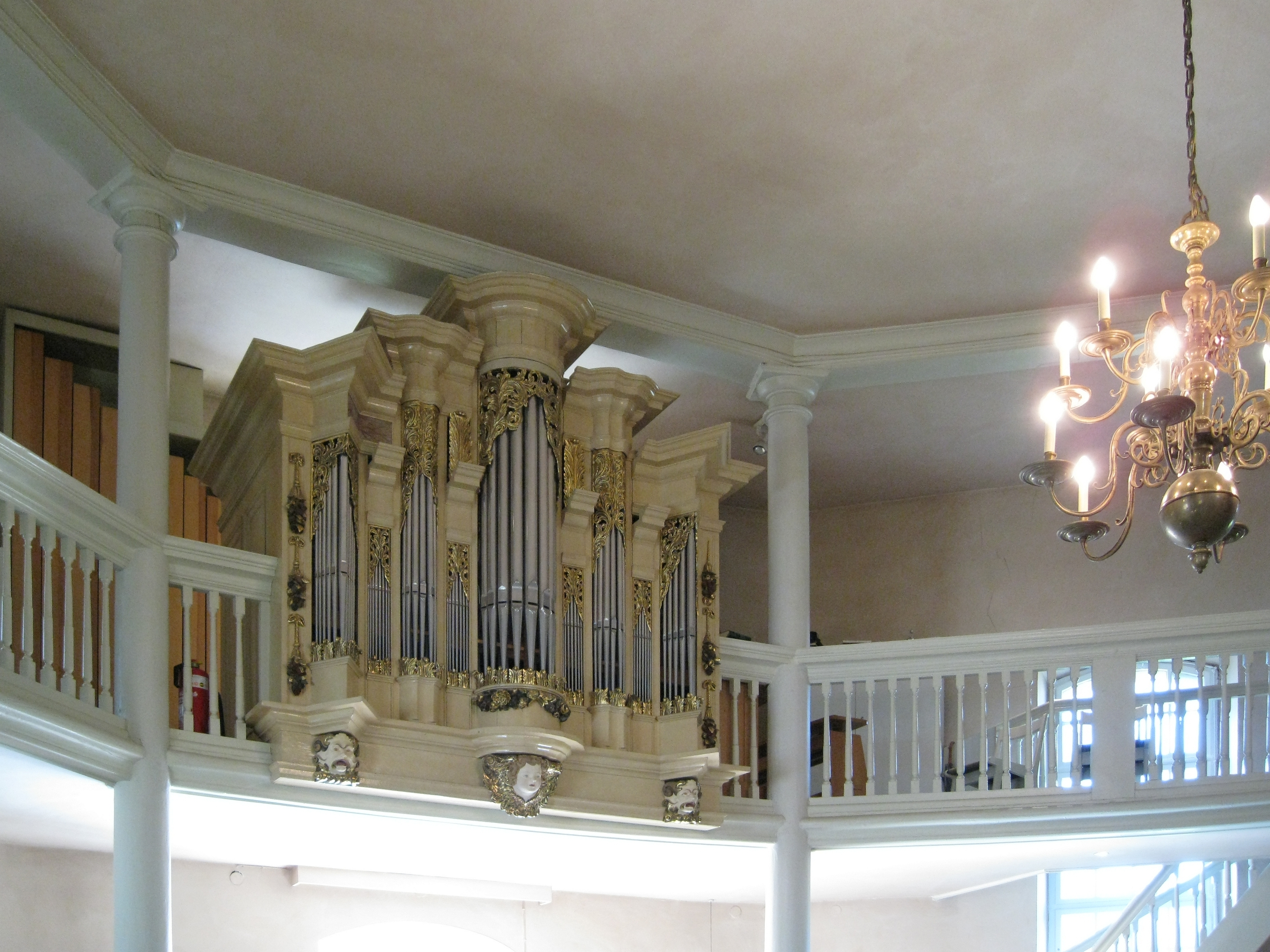 Die über hundert Jahre alte Orgel der Dorfkirche Zehlendorf